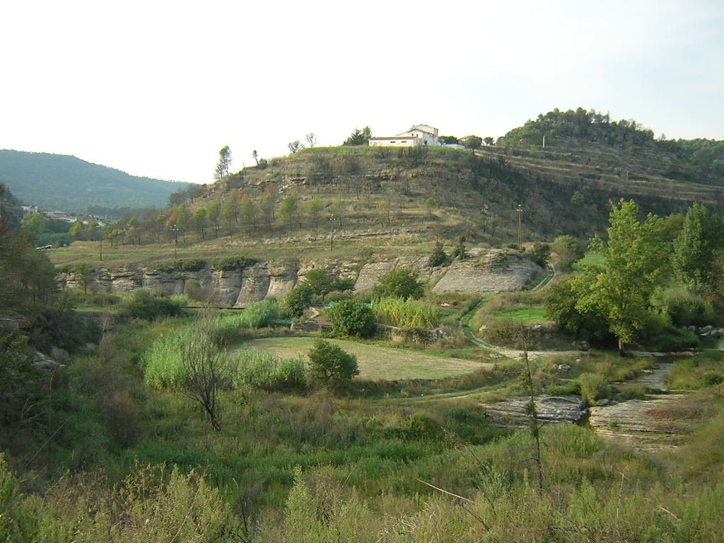 Saladic (Monistrol de Calders, Moianès)